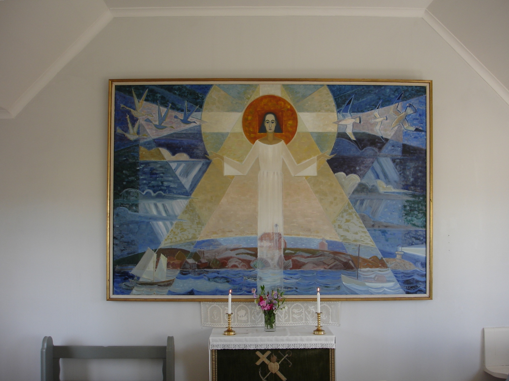 Altartavla